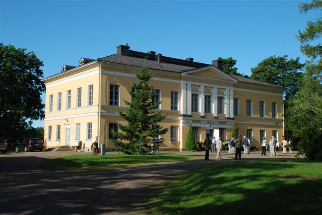 Moision Kartano Elimäellä